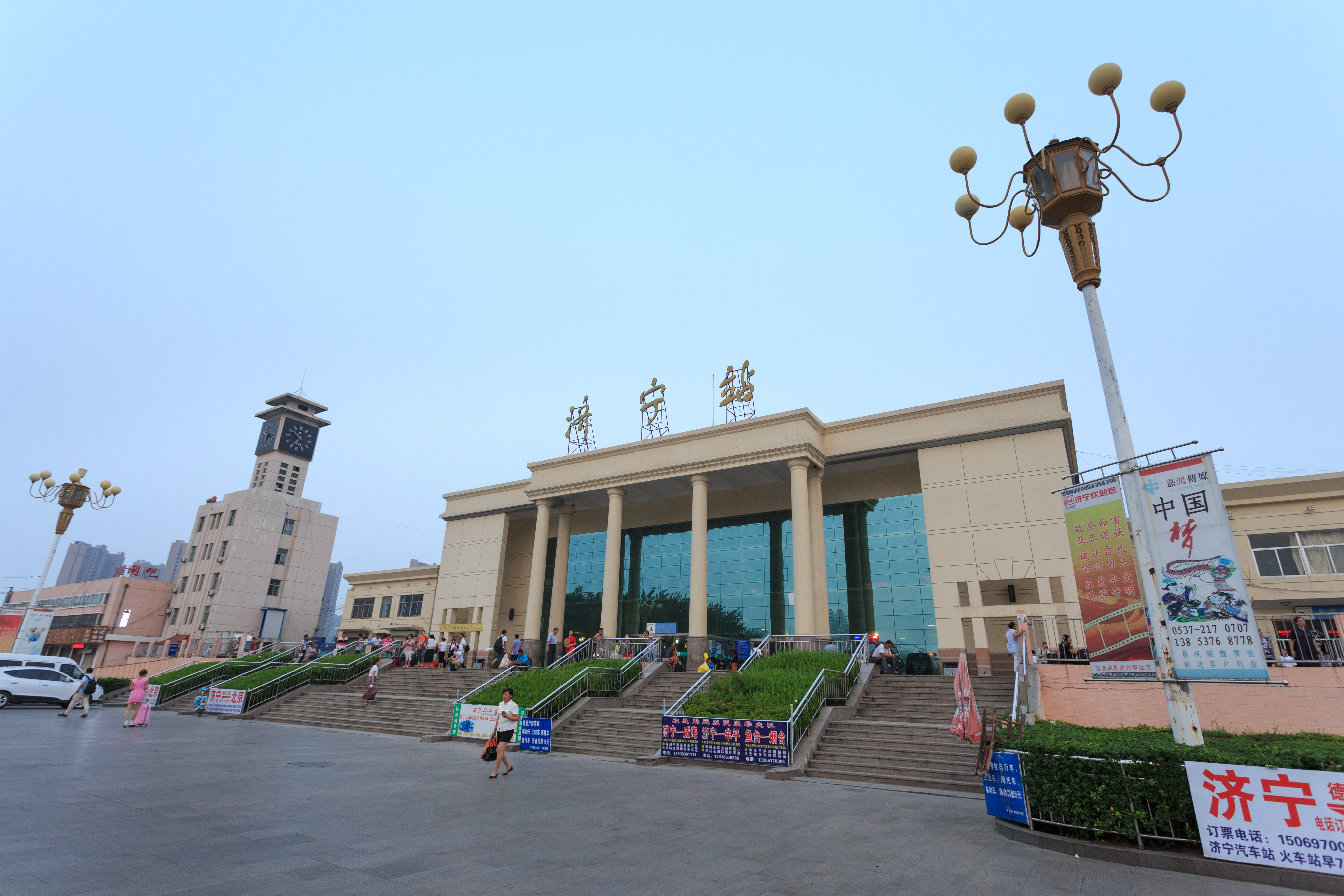 济宁站